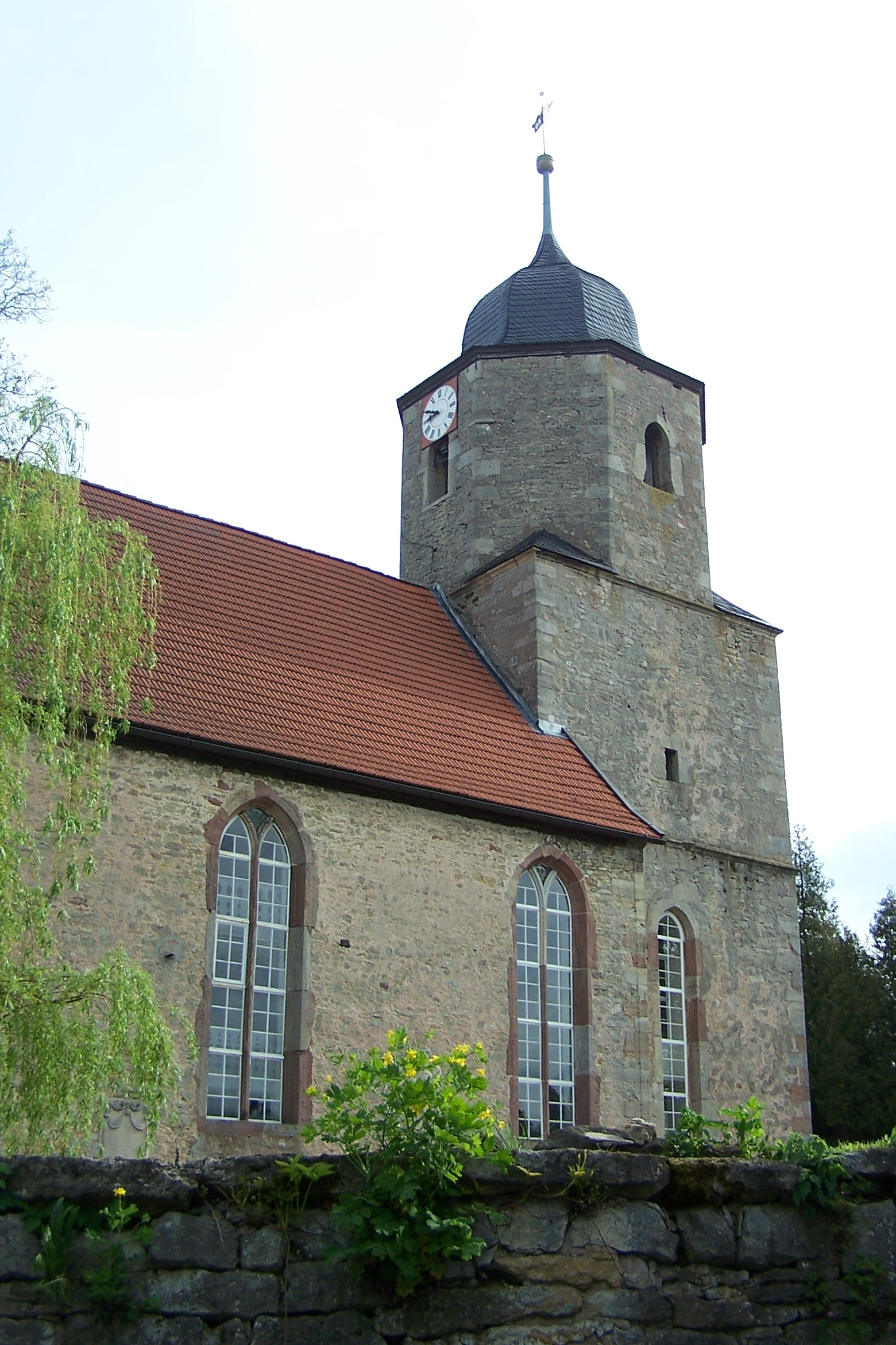 Teilansicht der Kirche von Süden.